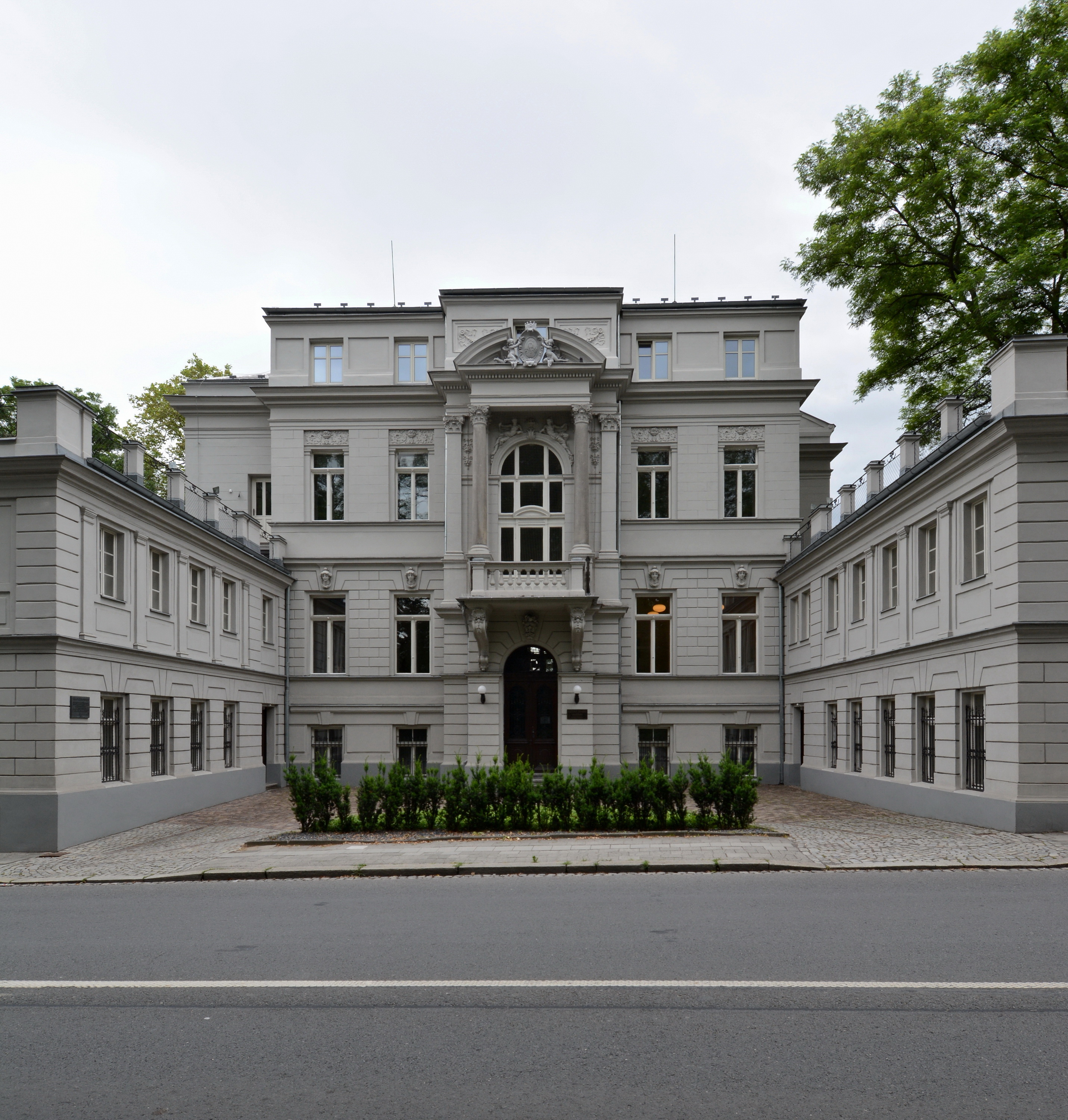 Palác Razumovských (Opava), Nádražní okruh 669/31, Opava